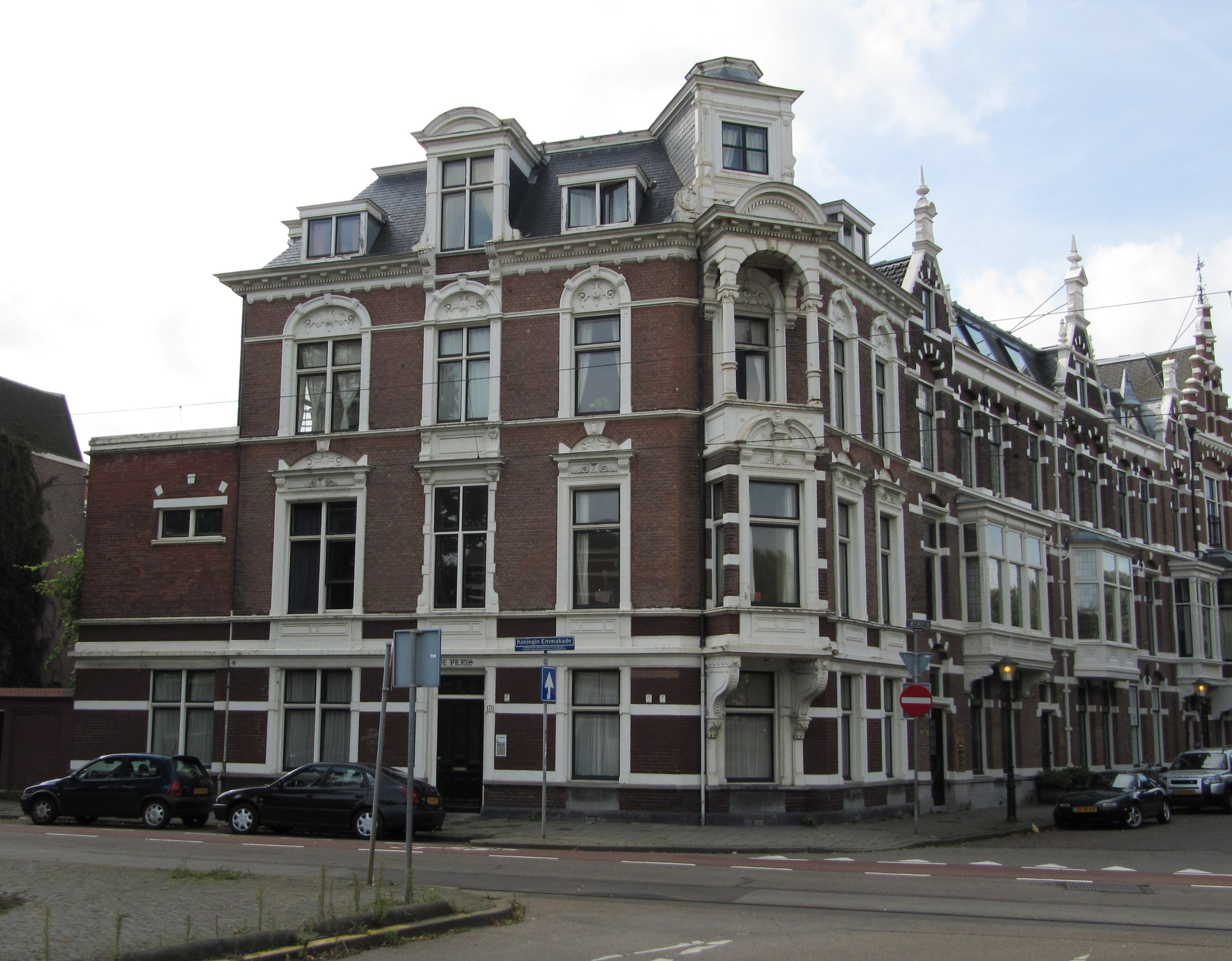 RM17628 Den Haag - Kon Emmakade 170.jpg